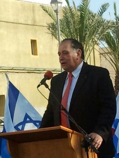 The inauguration ceremony renovation Paris Square in Haifa, presence Bertrand Delanoë mayor of Paris Yona Yahav Mayor of Haifa טקס חנוכת כיכר פריז בעיר התחתית בחיפה. הכיכר שופצה במימון עיריית פריז. בטקס נכמו ראש עיריית פריז ברטראן דלנואה, יונה יהב ראש עיריית חיפה, חדוה אלמוג סגנית ראש העירייה, הרב של חיפה שאר ישוב כהן, ונכבדים רבים מכל העדות של חיפה והקהל הרחב. יונה יהב